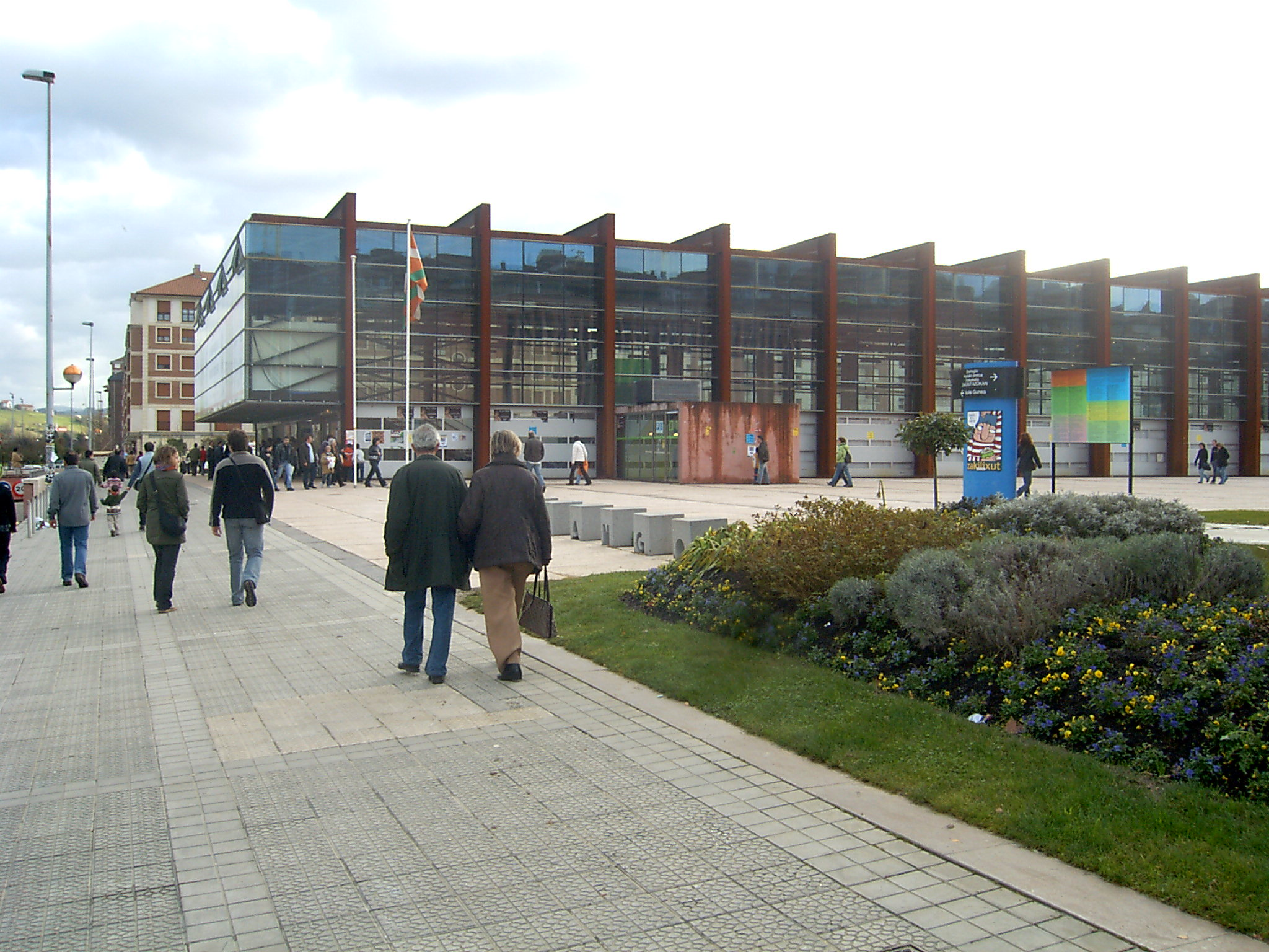 Durangoko liburu azokako eraikina